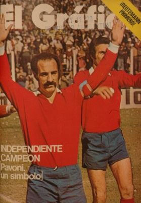 Ricardo Elbio Pavoni. Independiente Campeon 1971. Revista El Gráfico nro2713.